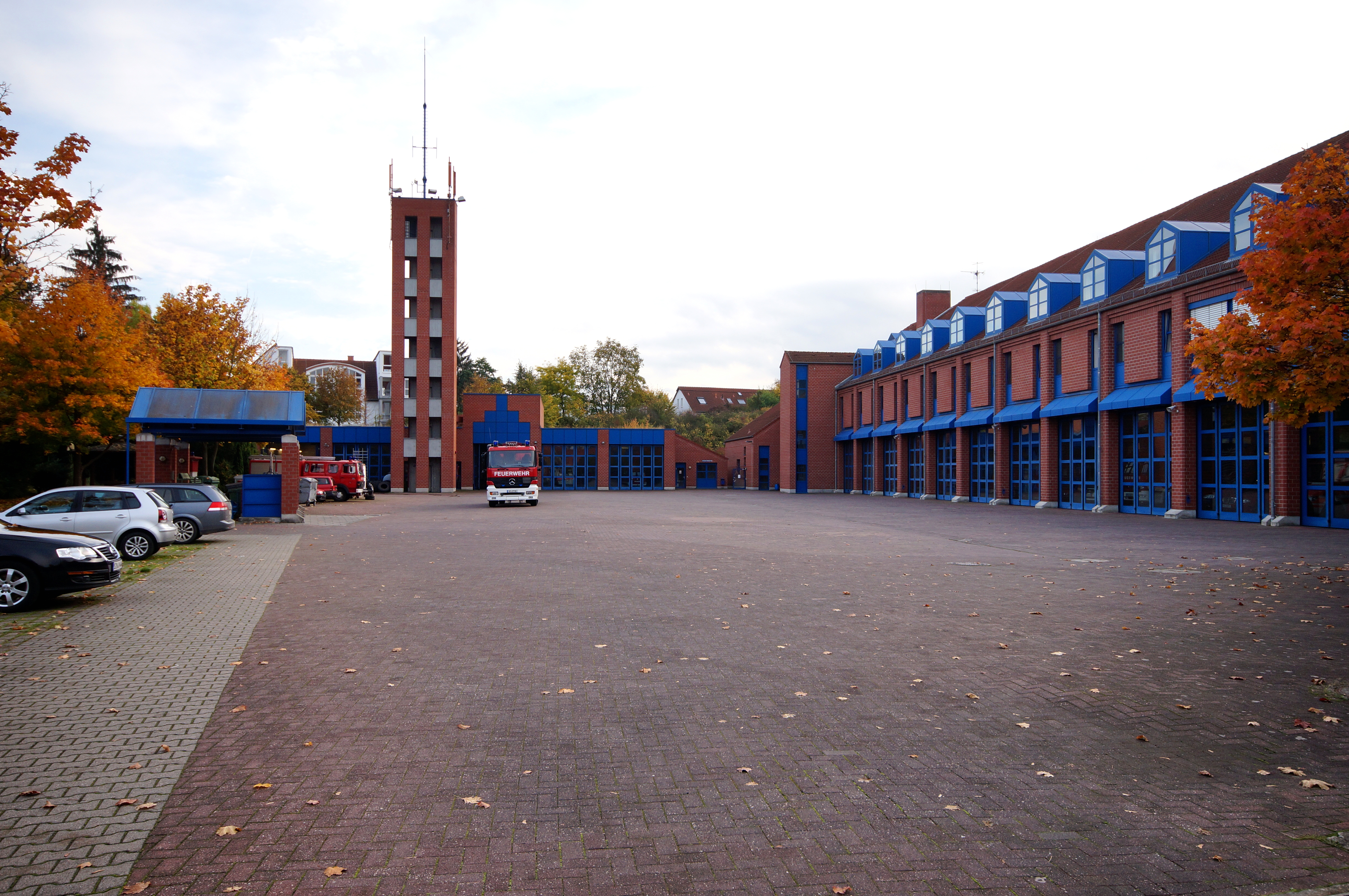 Der Hof des Sitzes und der Feuerwache 1 der Berufsfeuerwehr Mainz in der Jakob-Leischner-Straße 11 in Mainz-Bretzenheim.